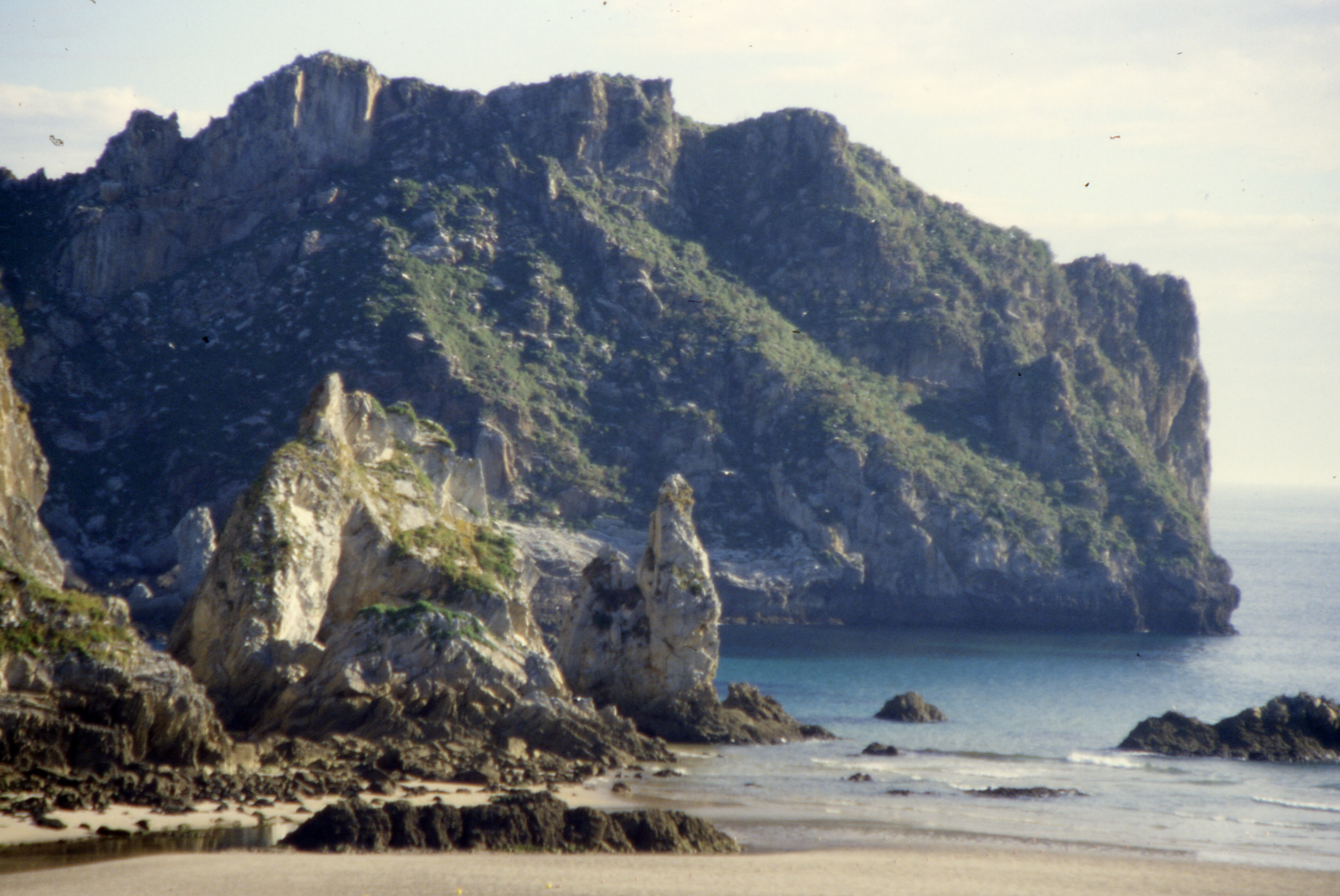 RibadedevaStrand2